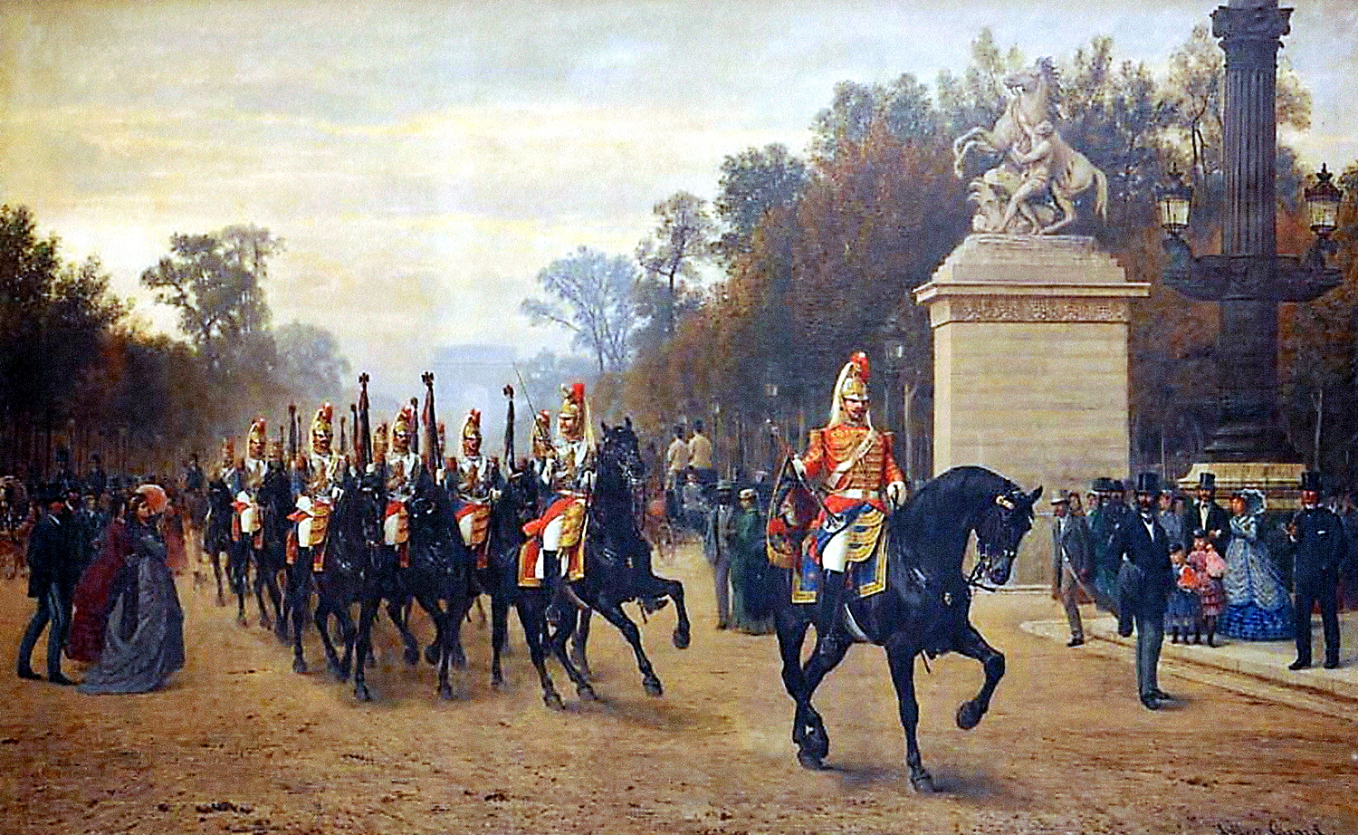 « Le Peloton des étendards des Cent-Gardes revenant de la revue sur les Champs-Elysées » Huile sur toile 2,65 m x 4,17 m 1869